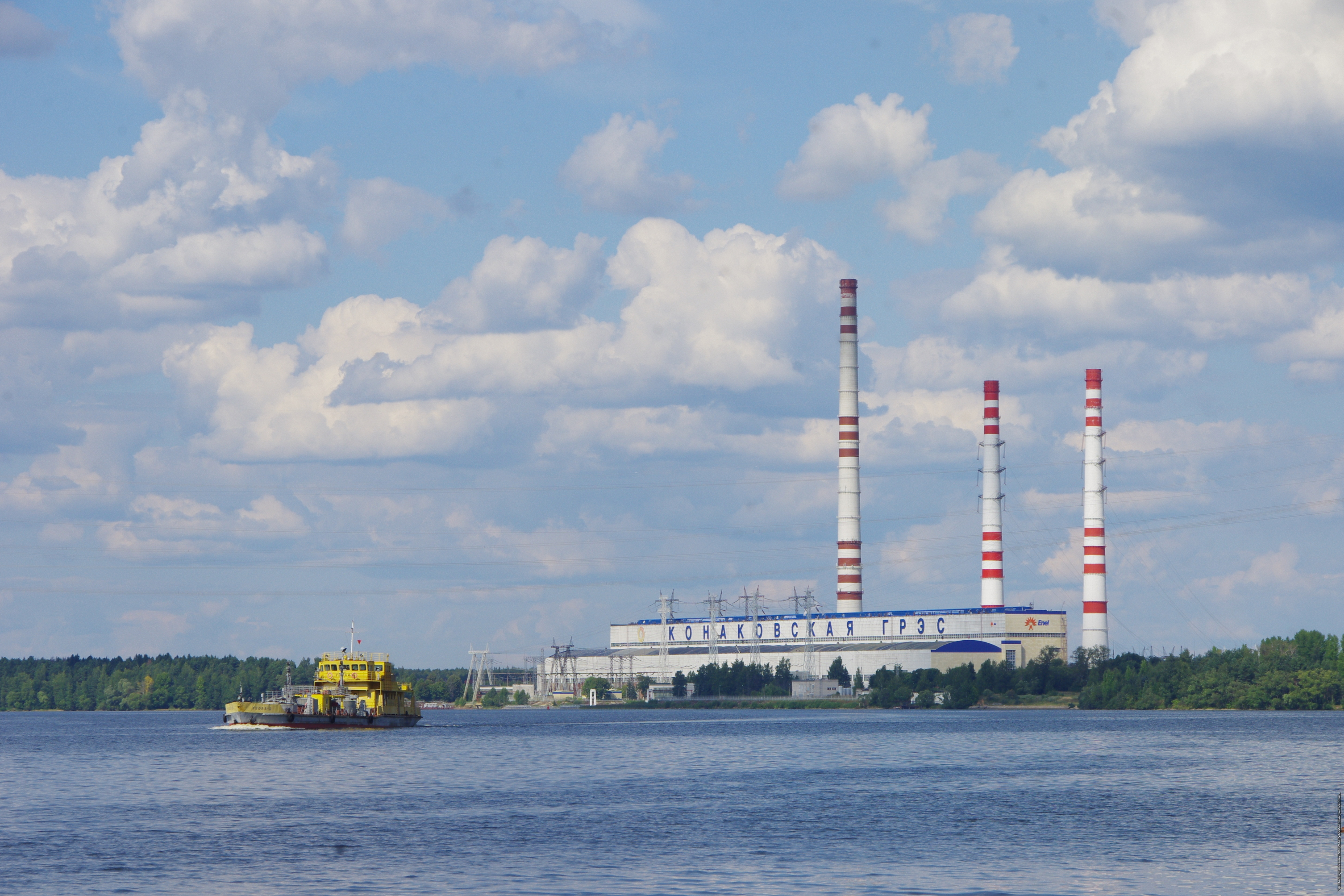 ul. Gagarina, 18, Konakovo, Tverskaya oblast', Russia, 171253